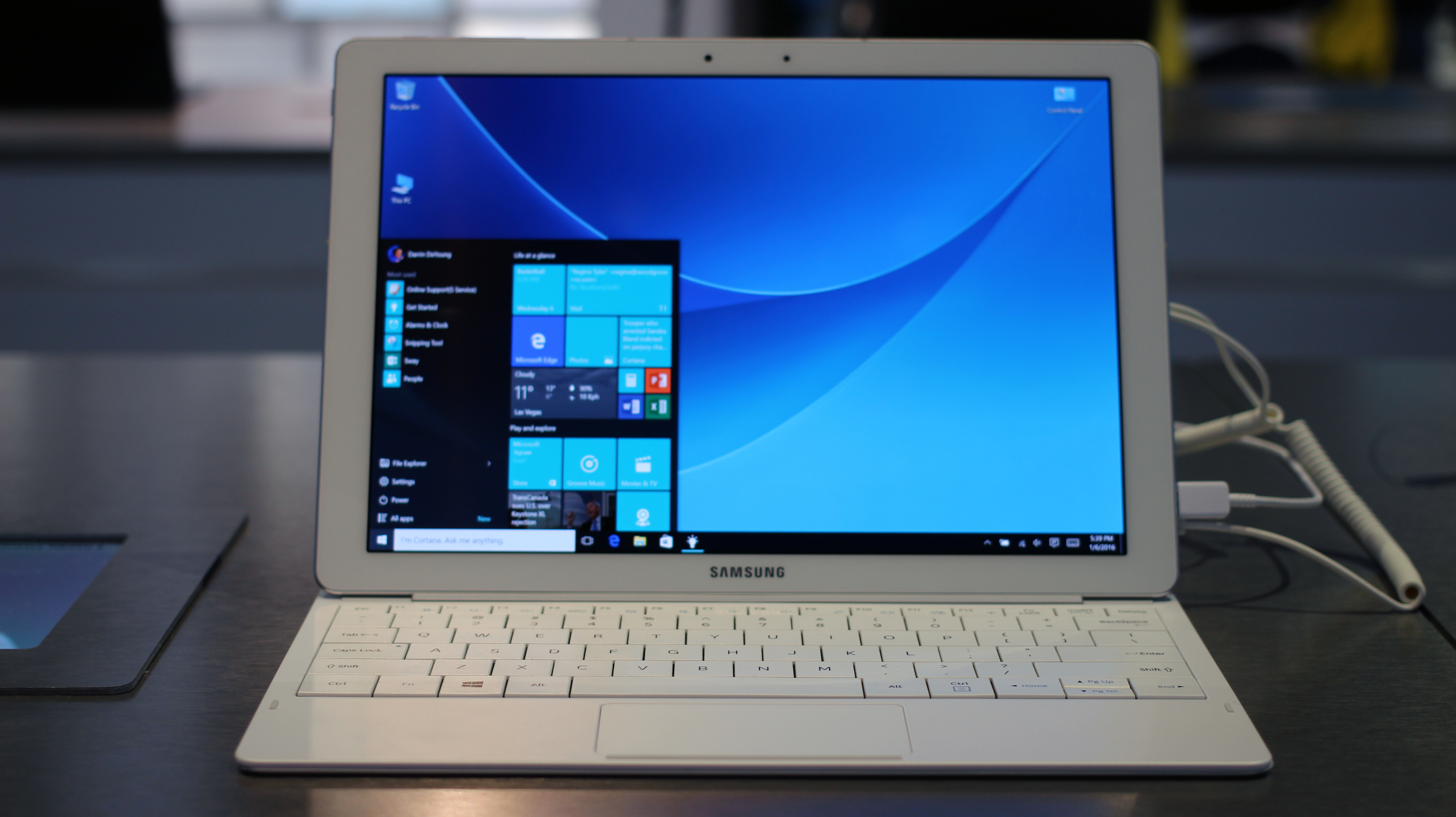 Samsung Galaxy TabPro S